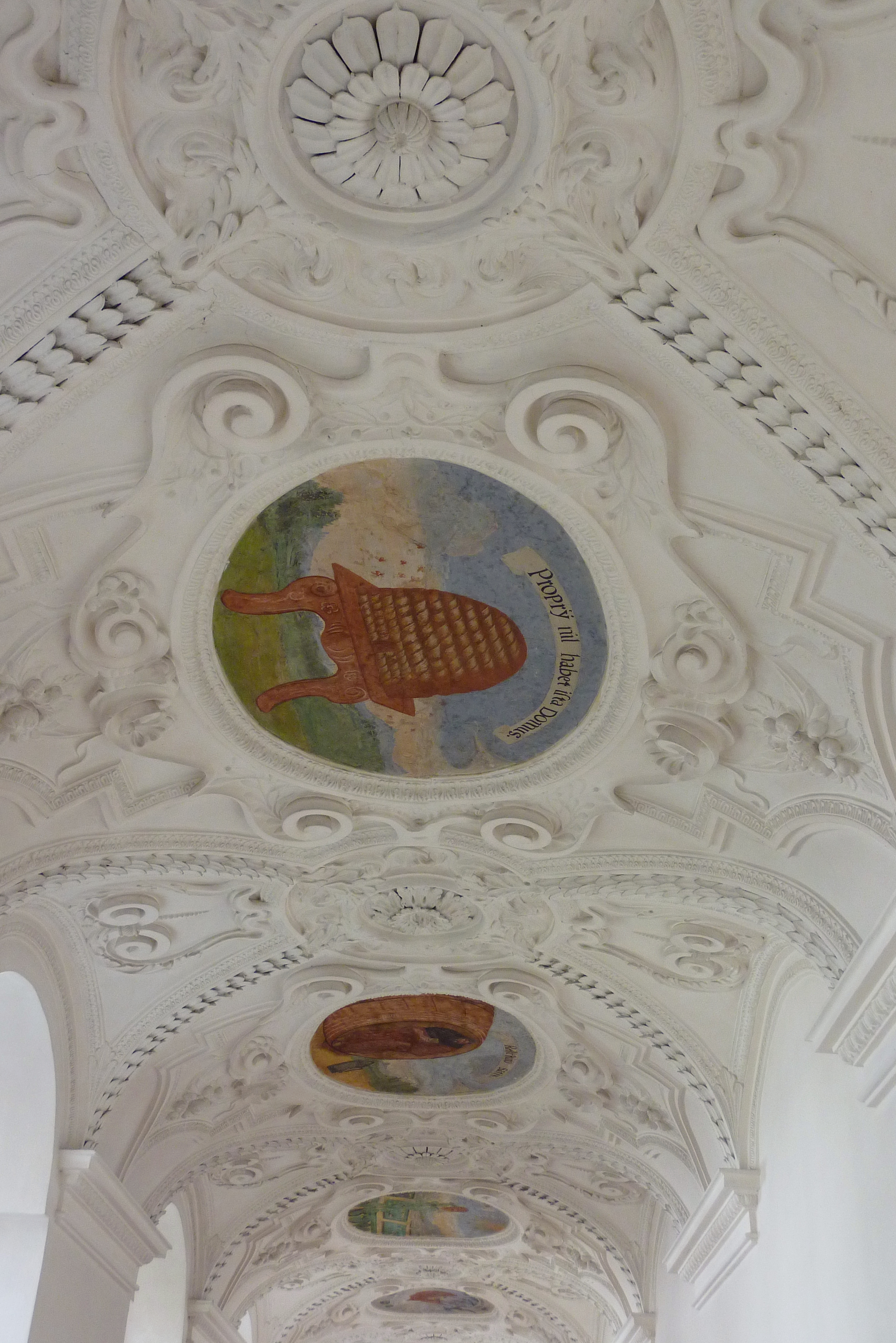 Kreuzgang mit Emblematischer Deckenmalerei (Secco-Malerei) Kloster Wettenhausen in Kammeltal im Landkreis Günzburg (Bayern)